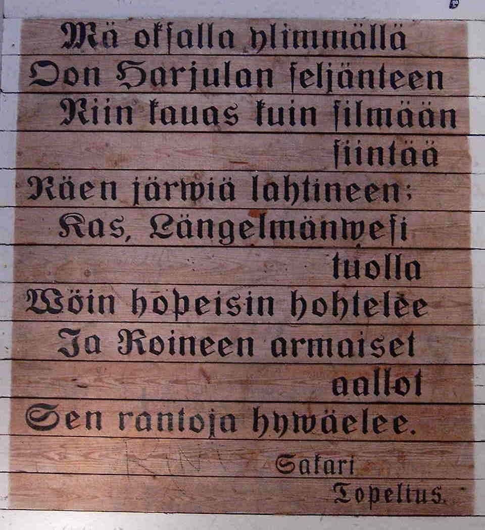 Kesäpäivä Kangasalla -laulun sanat Haralanharjun torniin maalattuina.